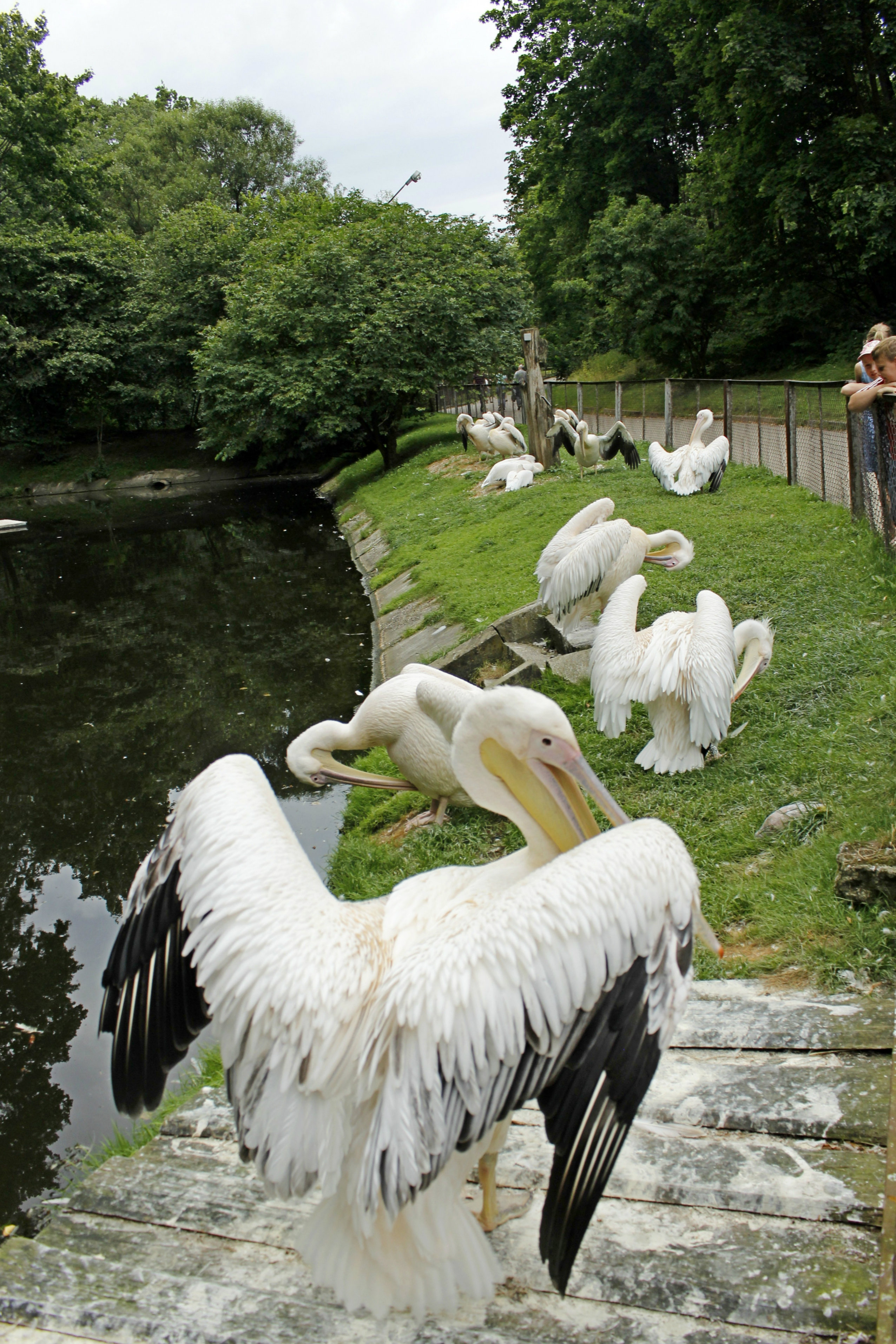 Rožiniai pelikanai Lietuvos zoologijos sode